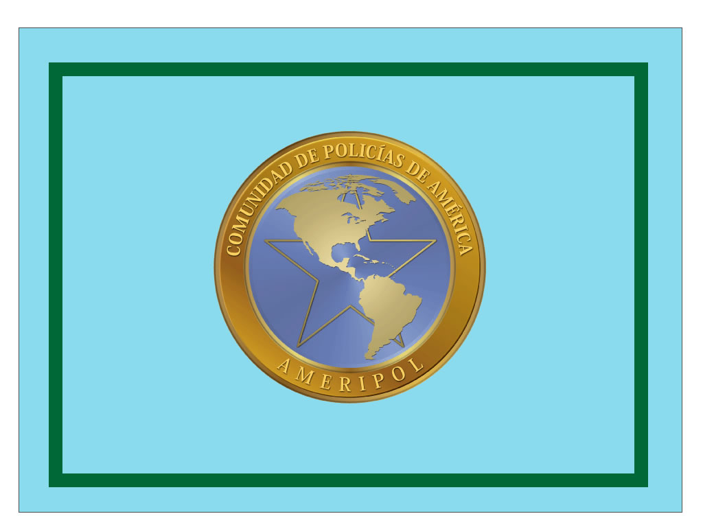 Bandera de la Comunidad de Policías de América